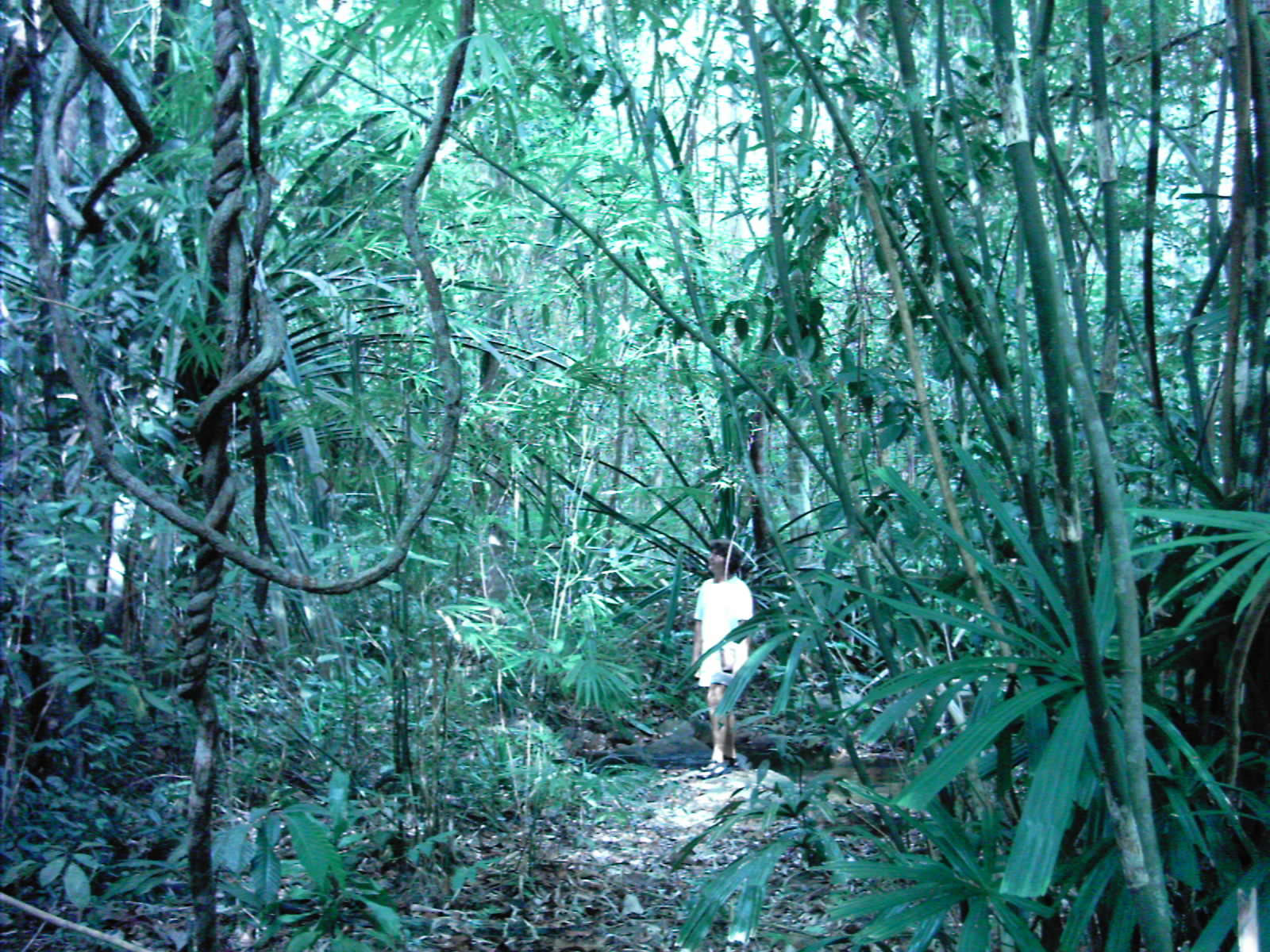 La jungle de Langkawi